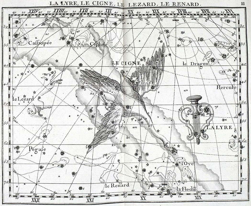 Atlas Coelestis